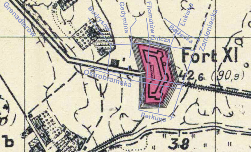 Fort XI Warszawa Grochów - lokalizacja na niemieckiej mapie terenów zaboru rosyjskiego z okresu I wojny światowej z 1914 roku z dodatkowo naniesioną siatką współczesnych ulic.